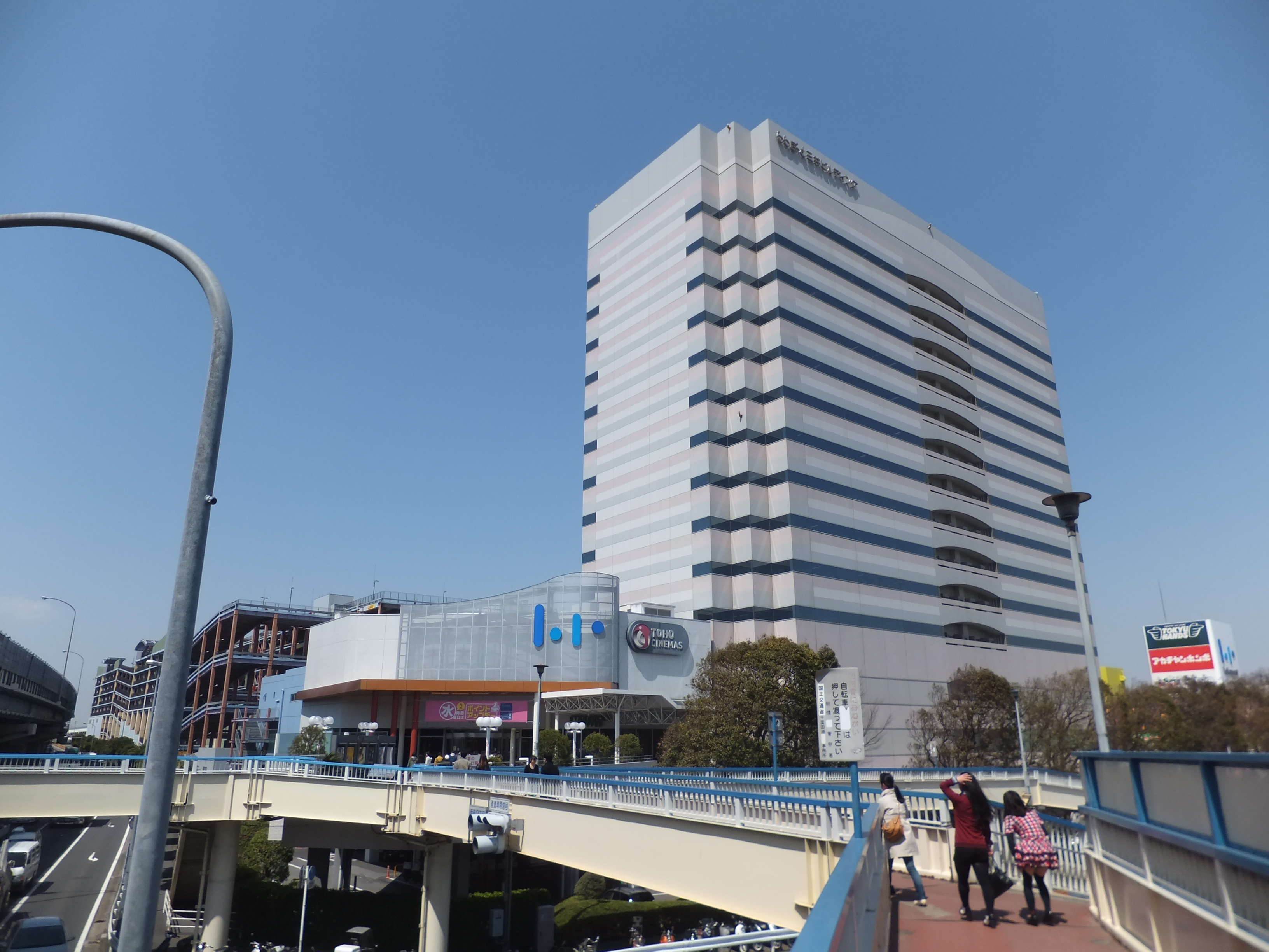 ららぽーとTOKYO-BAY入口とららぽーと三井ビルディング。京葉線南船橋駅からららぽーとまでは歩行者用の通路が整備されている。